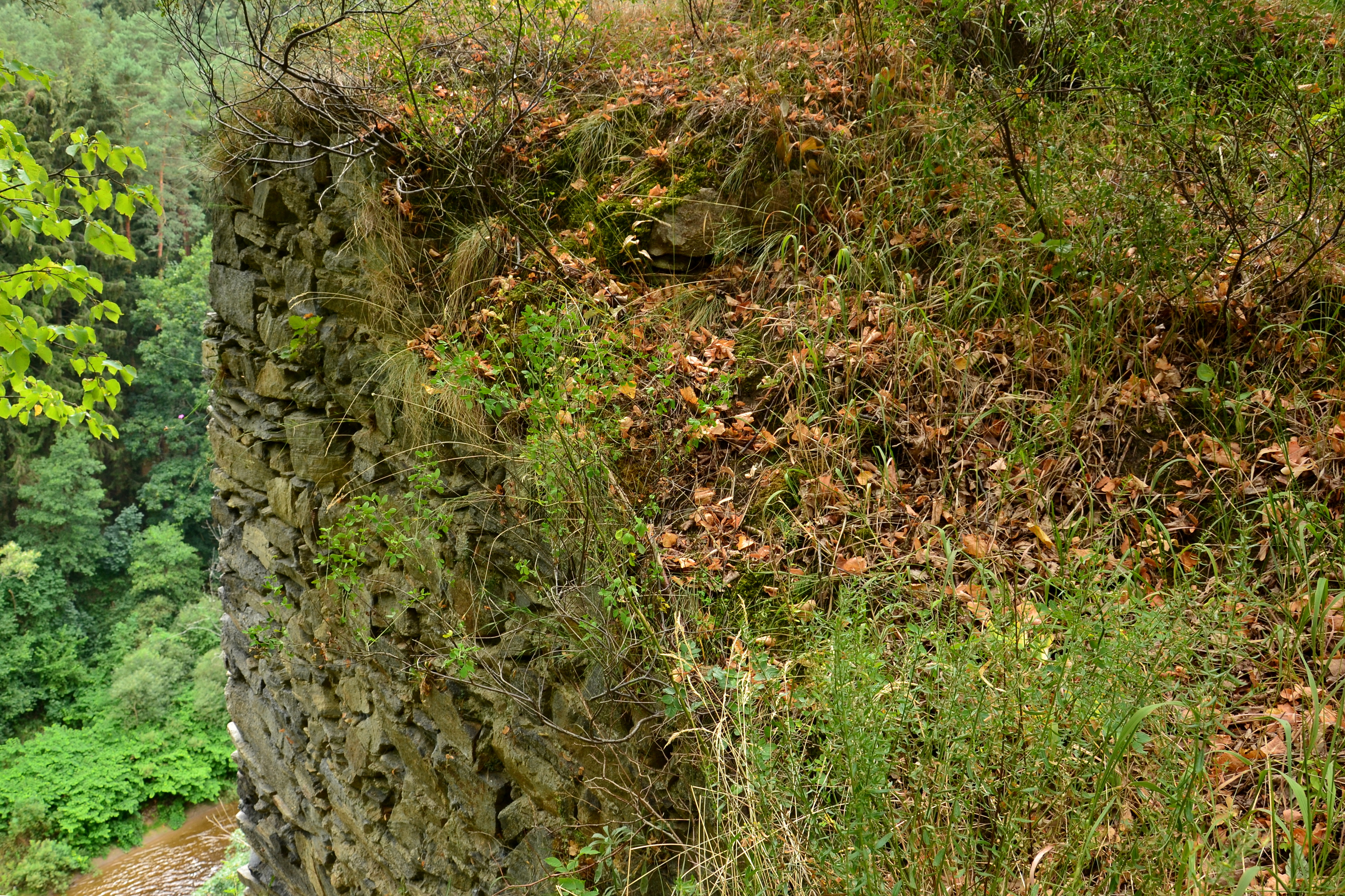 Jihovýchodní nároží budovy